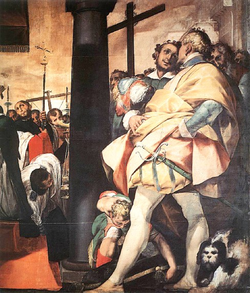 detail